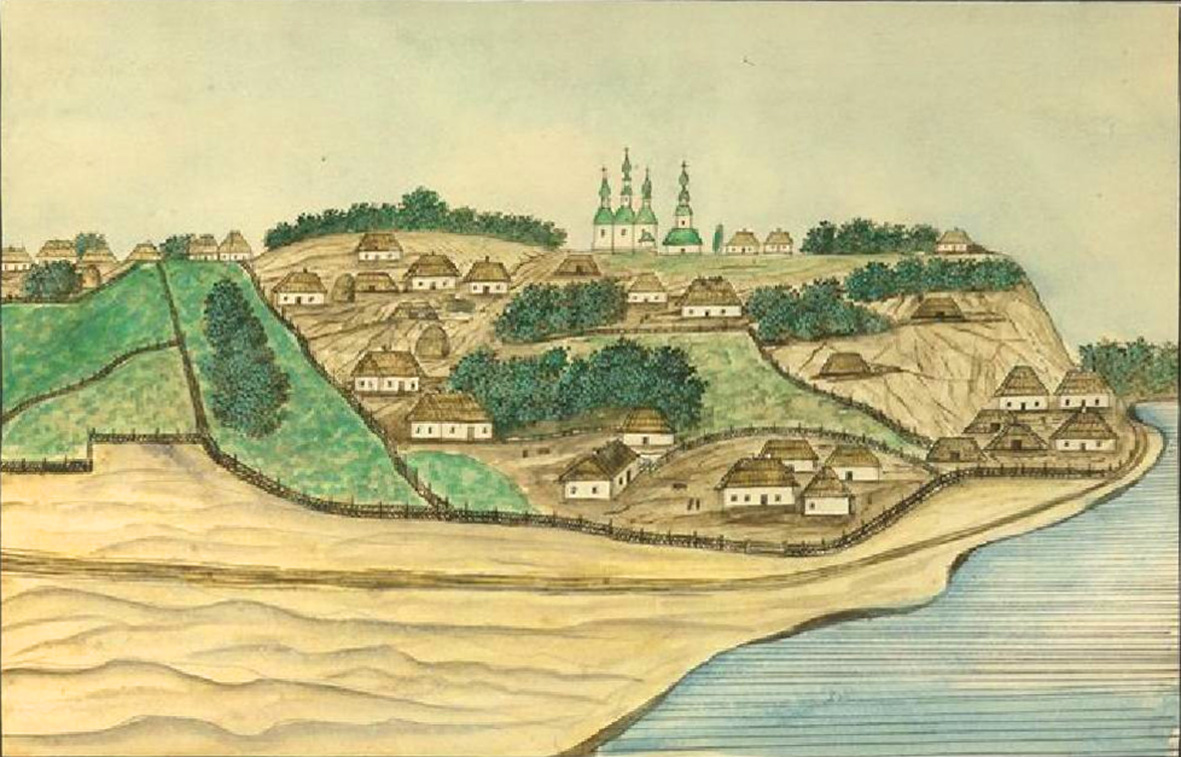 Вишгород. Домінік П'єр де ля Фліз. «Медико-топографічний опис державних маєтностей Київської округи з зображенням деяких природних витворів рослинного і тваринного світу, разом із статистикою кожного села, їхнім виглядом, зробленим з натури, зображенням селянських костюмів та географічною картою Київської округи». Київ, 1854. - с. 772